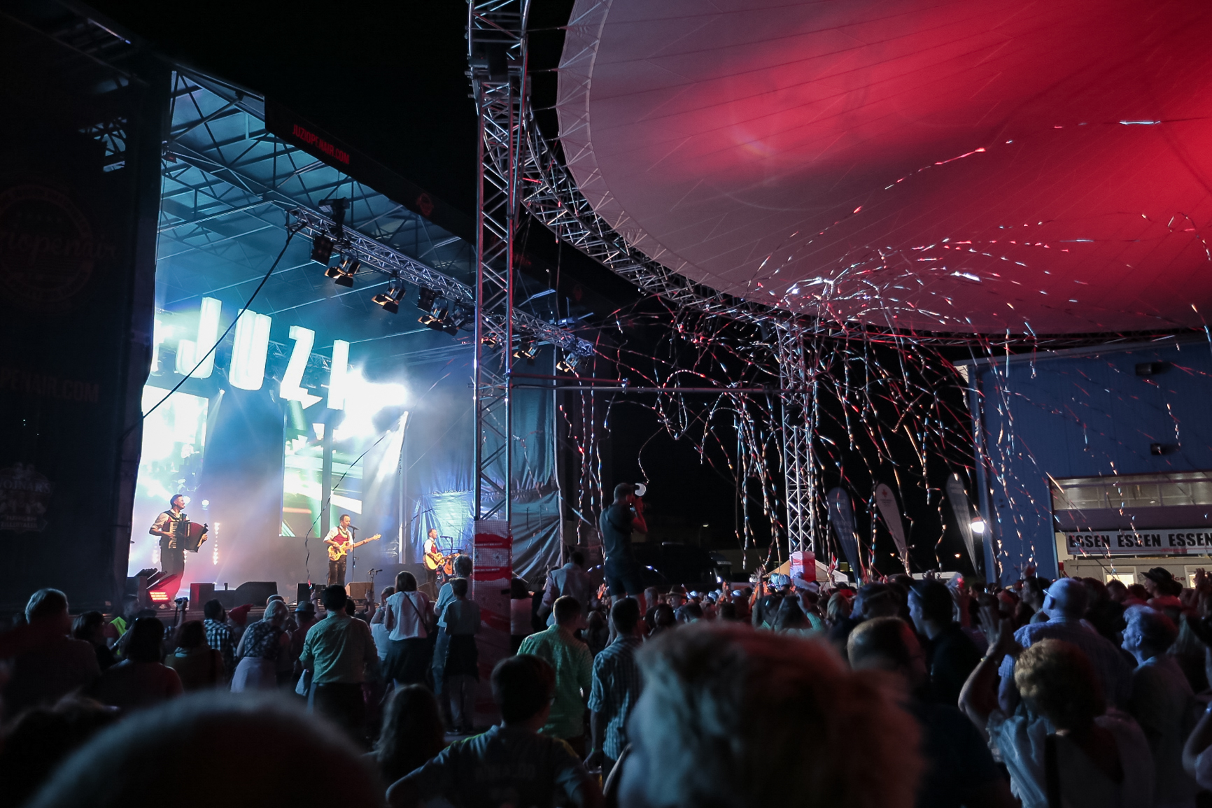 Die jungen Zillertaler - live beim JUZIopenair 2018 im August in Strass im Zillertal/Tirol. Von links: Michael Ringler, Markus Unterladstätter, Daniel Prantl.